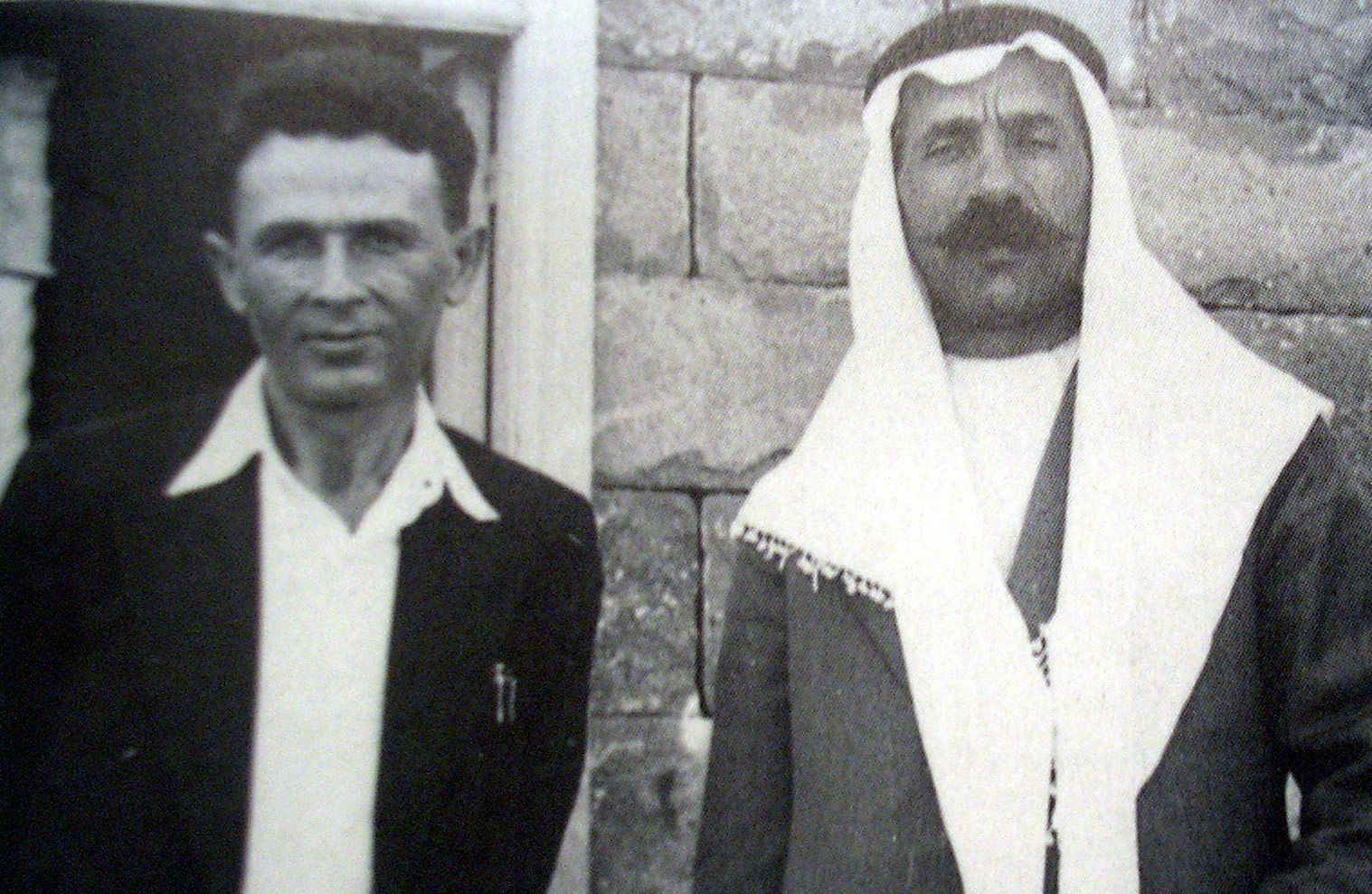 פגישת אבא חושי עם סולטאן אל אטרש.